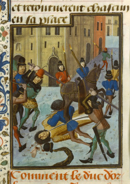 Meurtre du duc Louis d'Orléans, par le Maître de la Chronique d'Angleterre (enlumineur), (BnF)